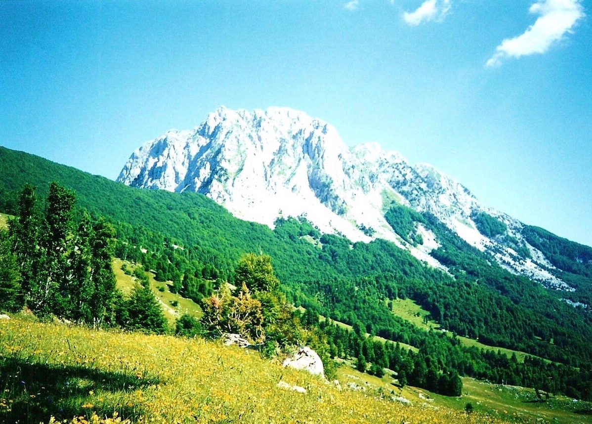 Maja e Ershellit dhe Pejdana